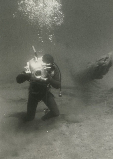 1968年摩周湖16mmシネマフイルムをまわす須賀次郎